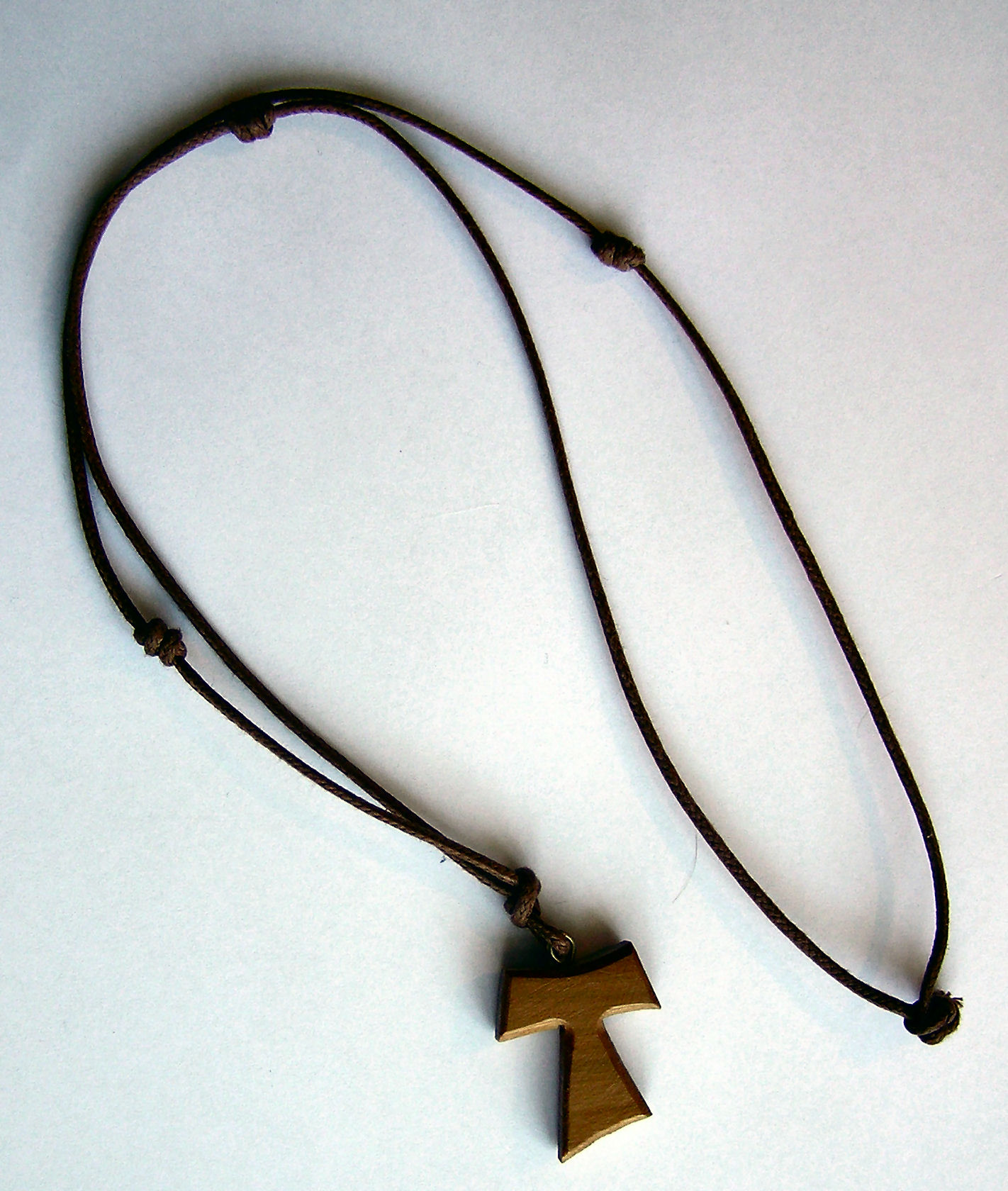 Tau cross